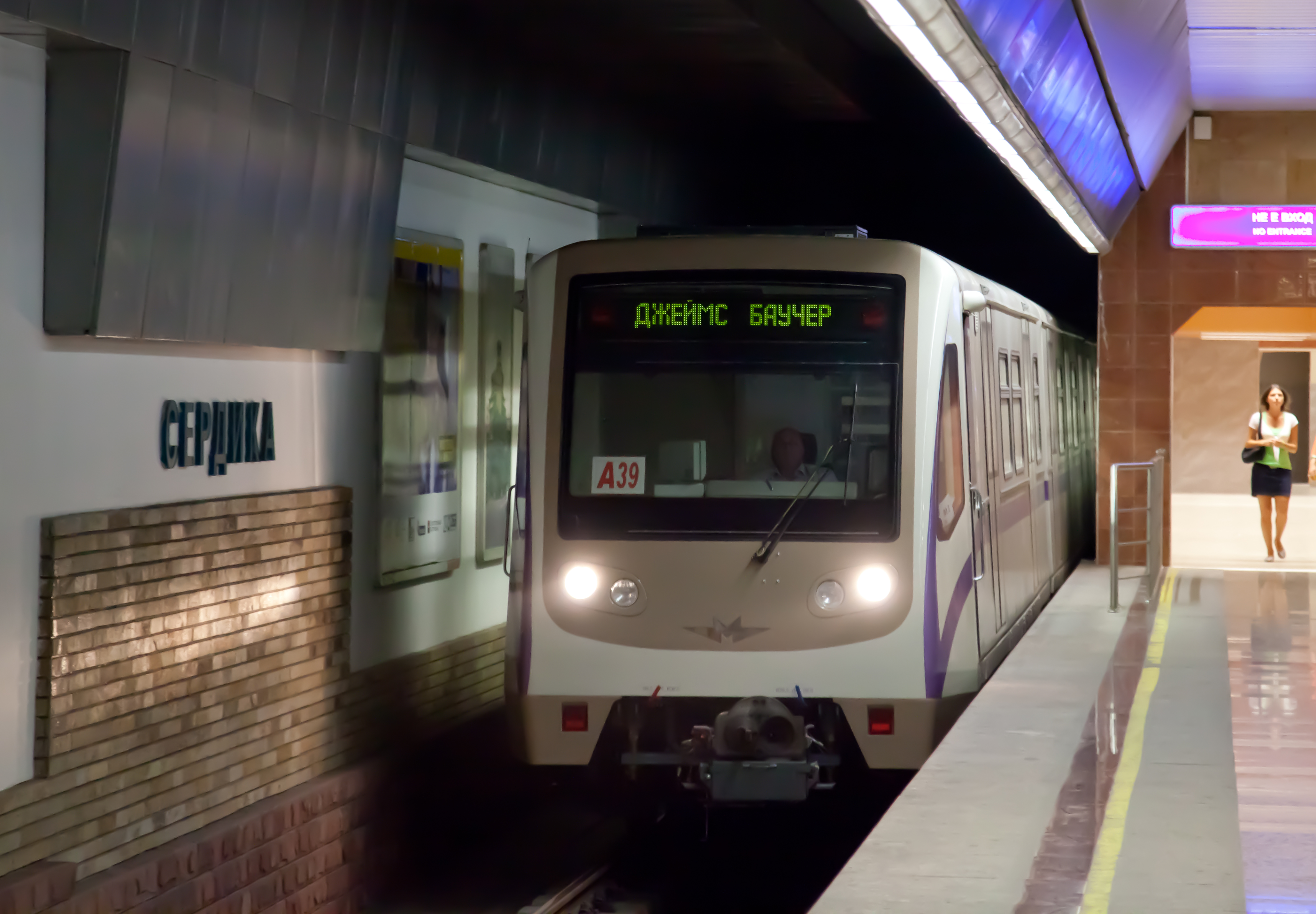 Sofia Metro;Station Serdica